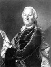 Georg Andreas Will (1727-1798) war ein Professor, Philosoph und Polyhistoriker.